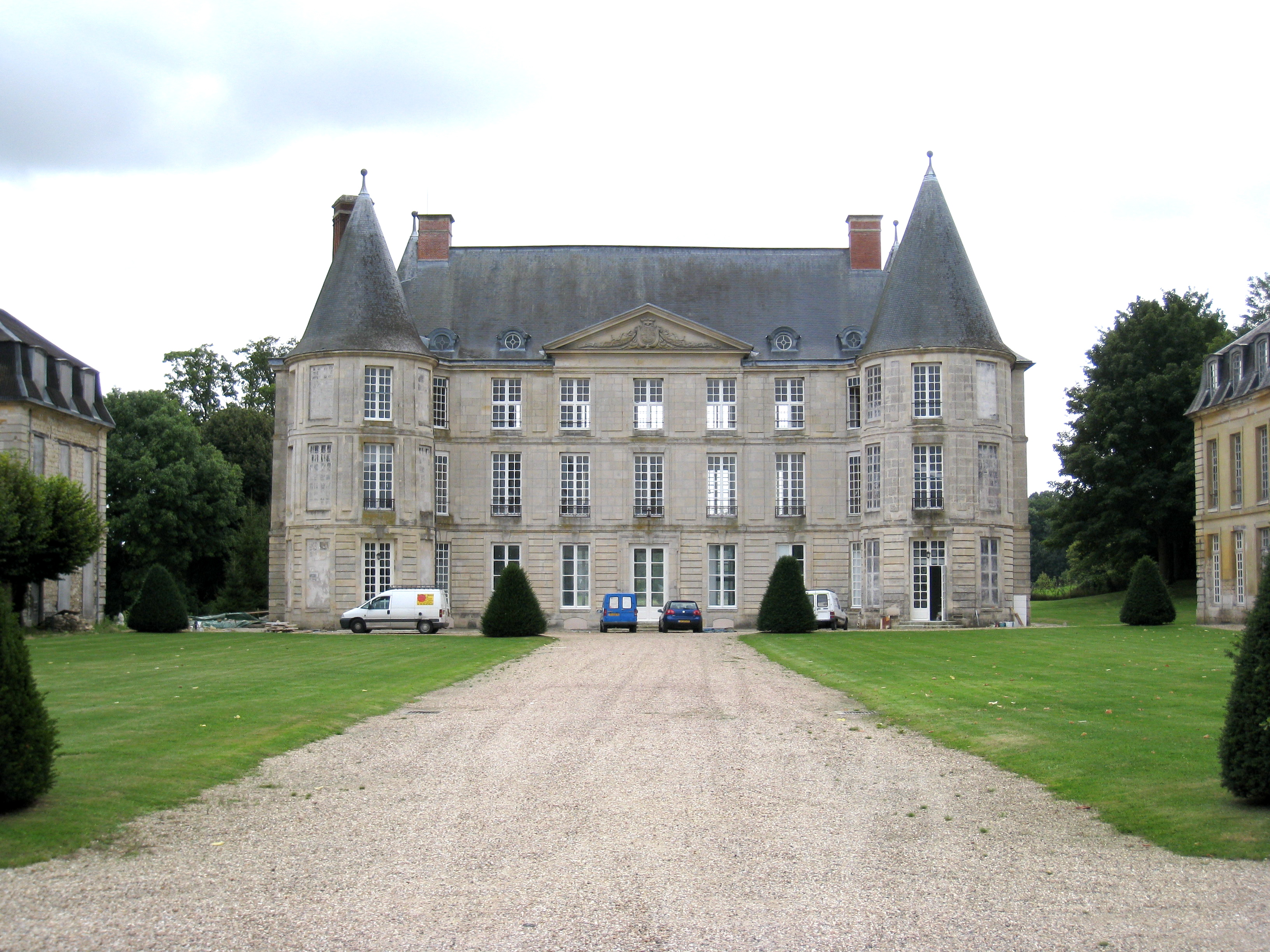 Chateau d'Hénonville, Oise, France